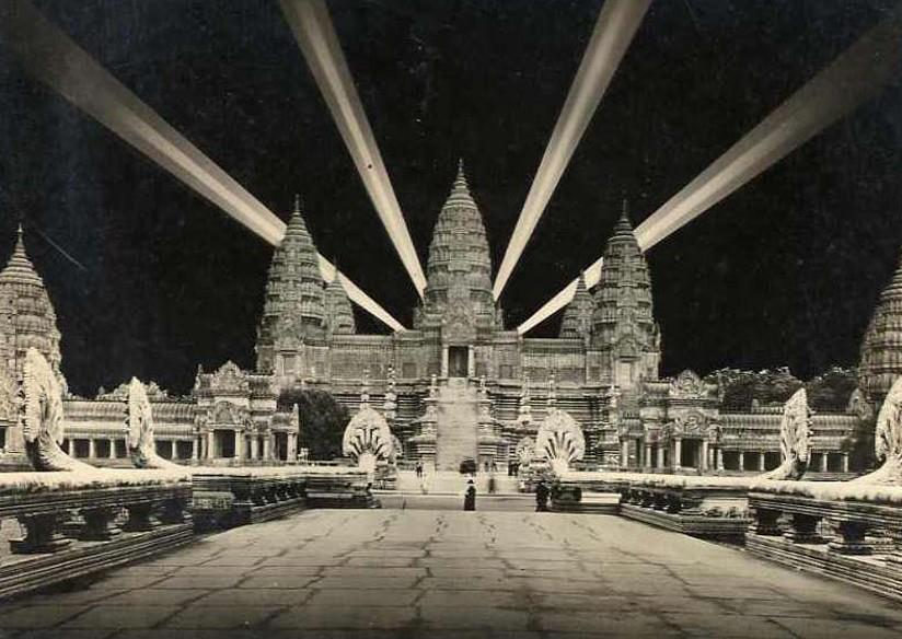 Макет храма Ангкор-Ват на Парижской колониальной выставке ночью